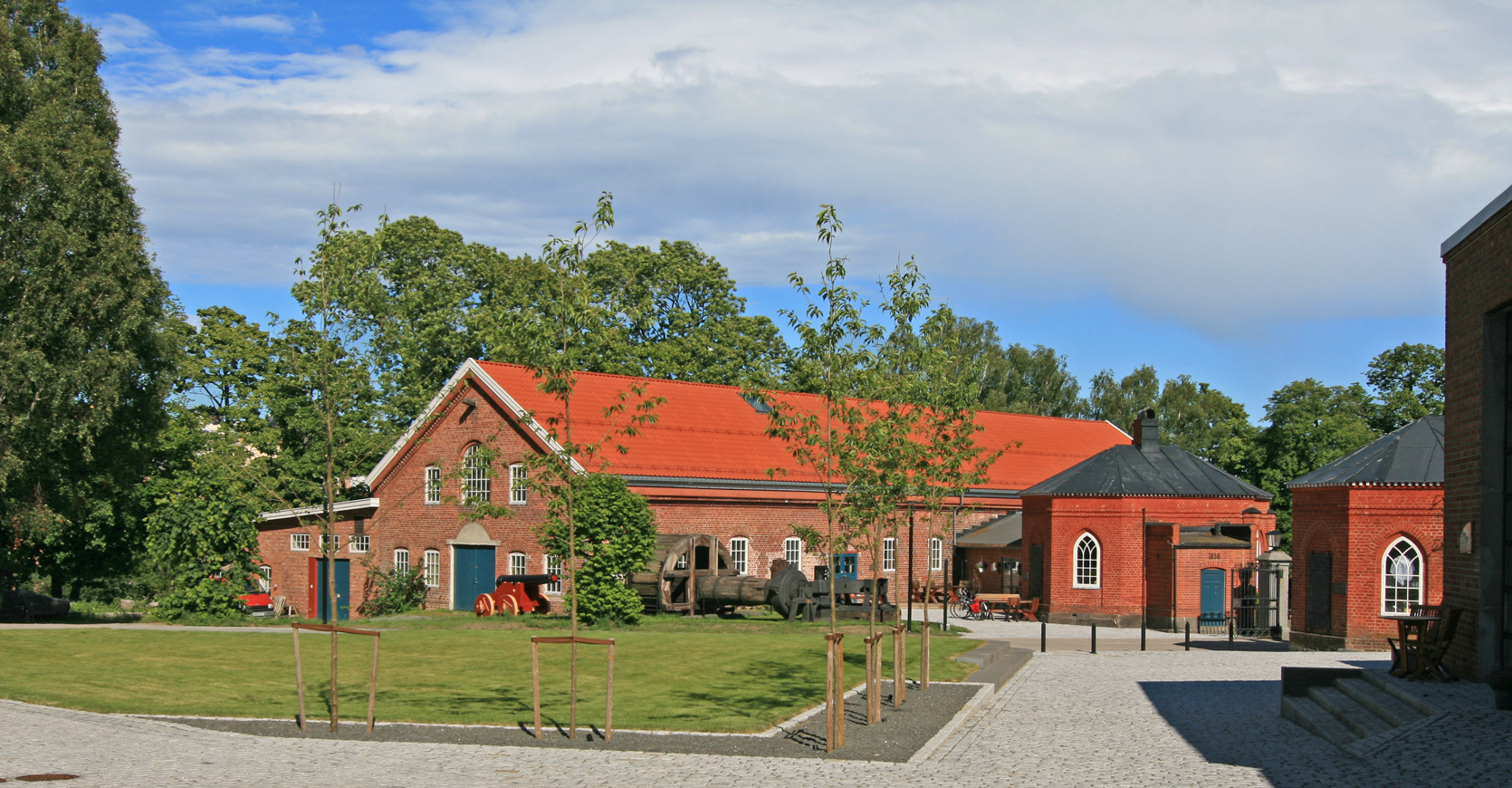 Larvik museum